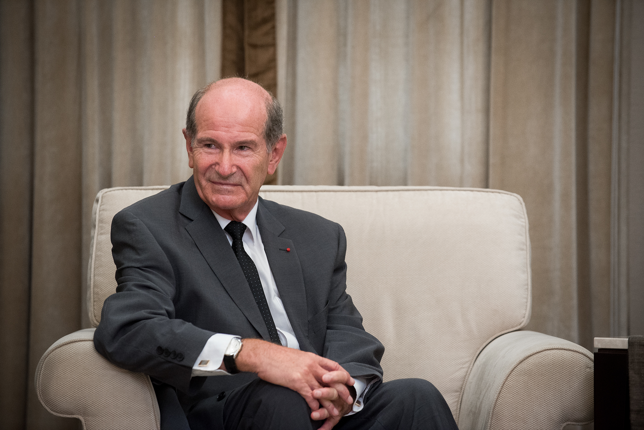 法國Clinatec生物醫學中心貝納畢主席貝納畢（Alim Louis Benabid）